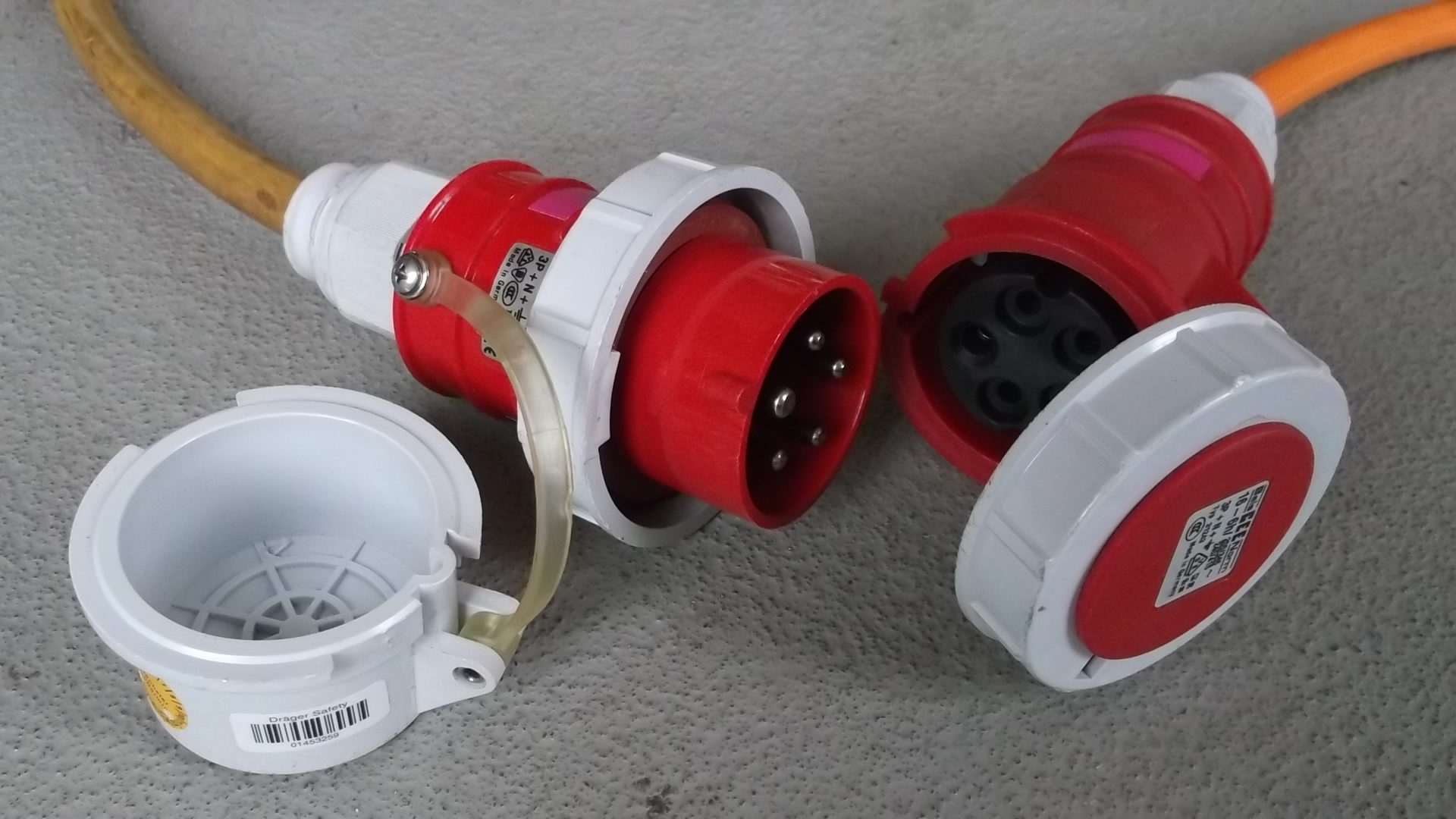 CEE 400V 16A 6h IP67 Drehstrom Stecker und Kupplung als noch ungesteckte Leitungsverbindung mit einem hohen Schutzgrad für den Außenbereich